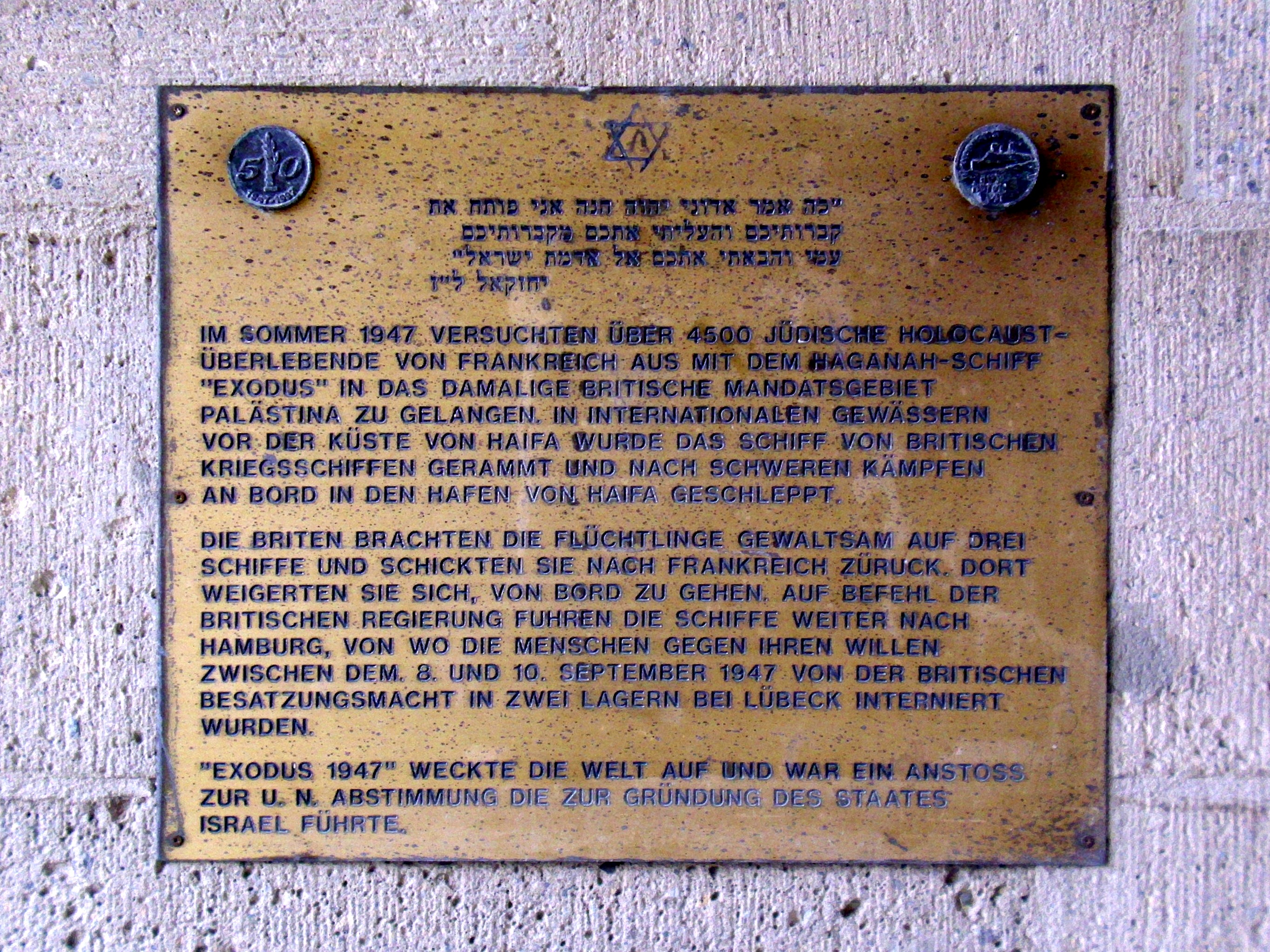 Gedenktafel zur Erinnerung an die Passagiere der Exodus auf der linken Seite des Durchganges zu Brücke 3 der St. Pauli-Landungsbrücken.